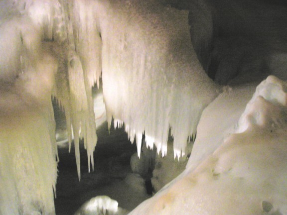 Velká ledová jeskyně (Rieseneishöhle)